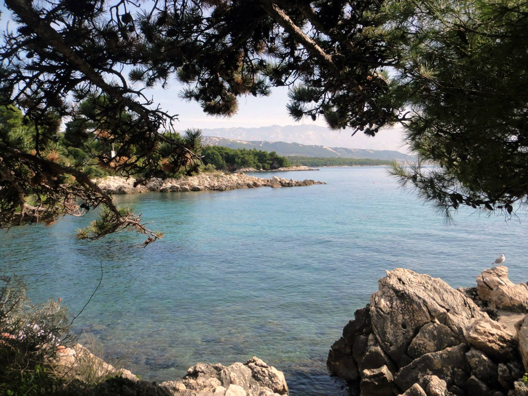 Suha Punta , Rab